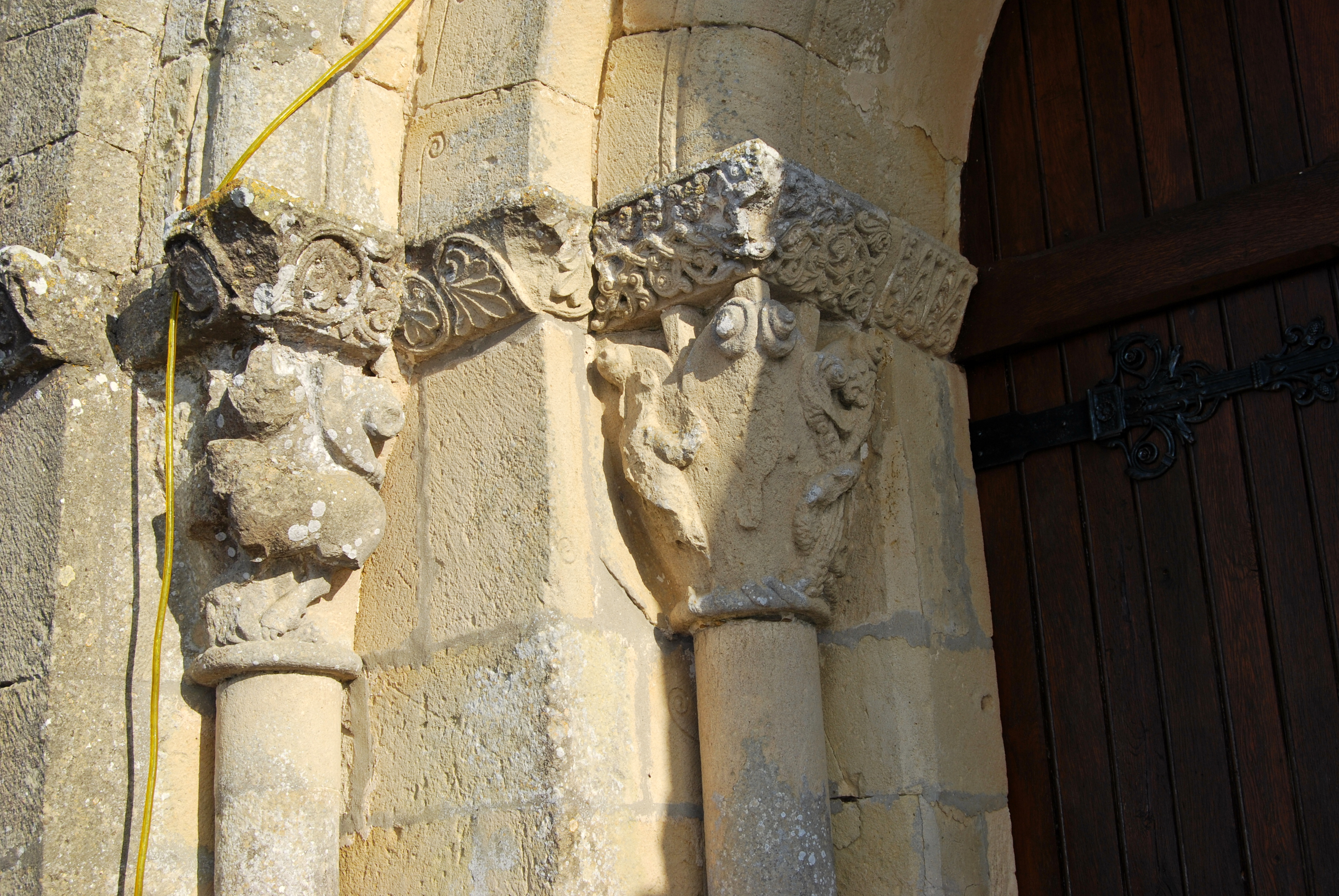 Eglise St Pierre de Mourens